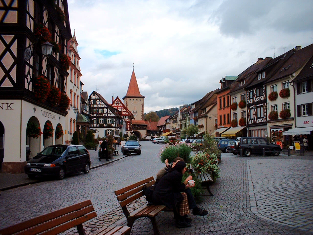 Gengenbach, Germany